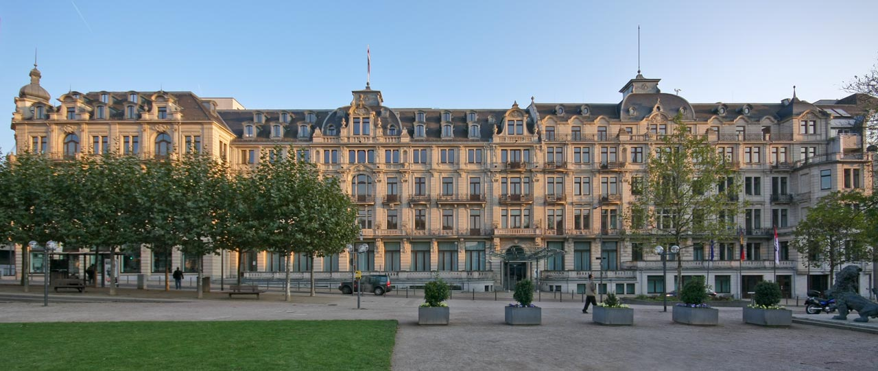 Fassade der hessischen Staatskanzlei im ehemaligen Hotel Rose am Kranzplatz in Wiesbaden